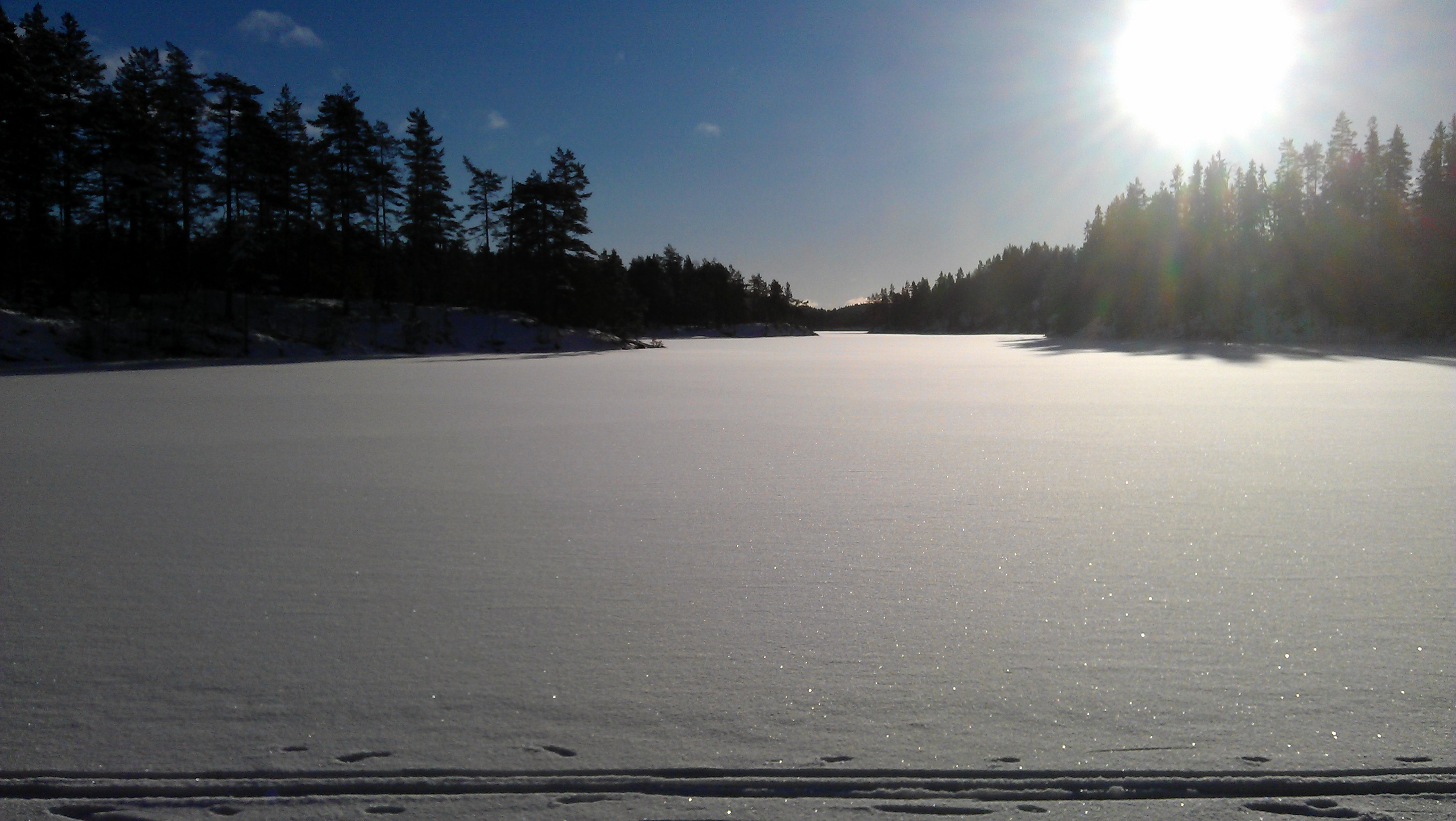 Aurset mellom Setskog og Lierfoss i Aurskog-Høland kommune.